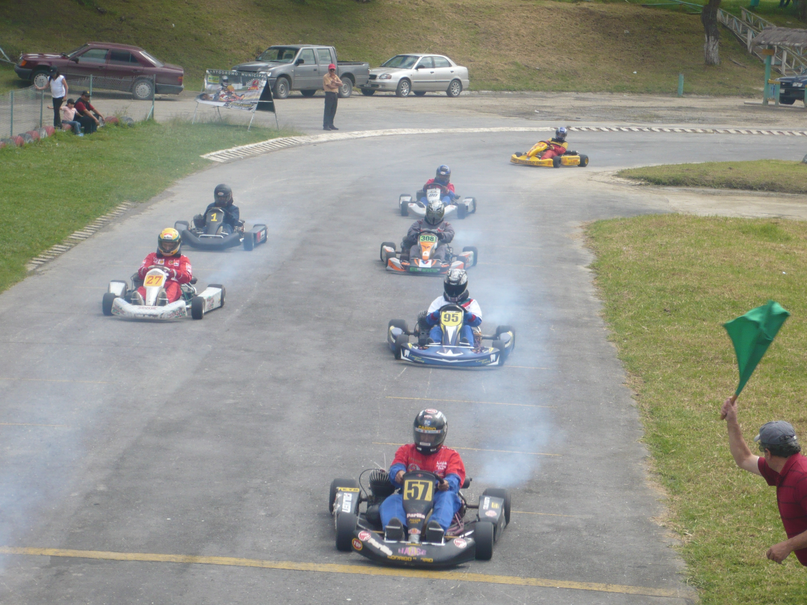 Partida de la "Copa Ecotel 2008"